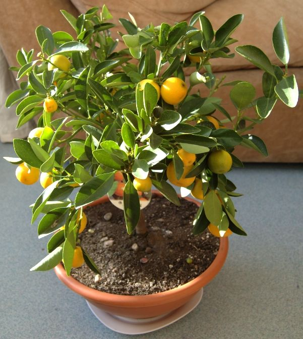 Calamondin, Citrus reticulata x Fortunella sp., syn: Citrofortunella microcarpa